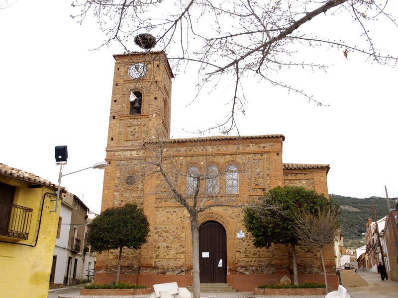 Iglesia Parroquial de Hinojosas de Calatrava, en la provincia de Ciudad Real (España)